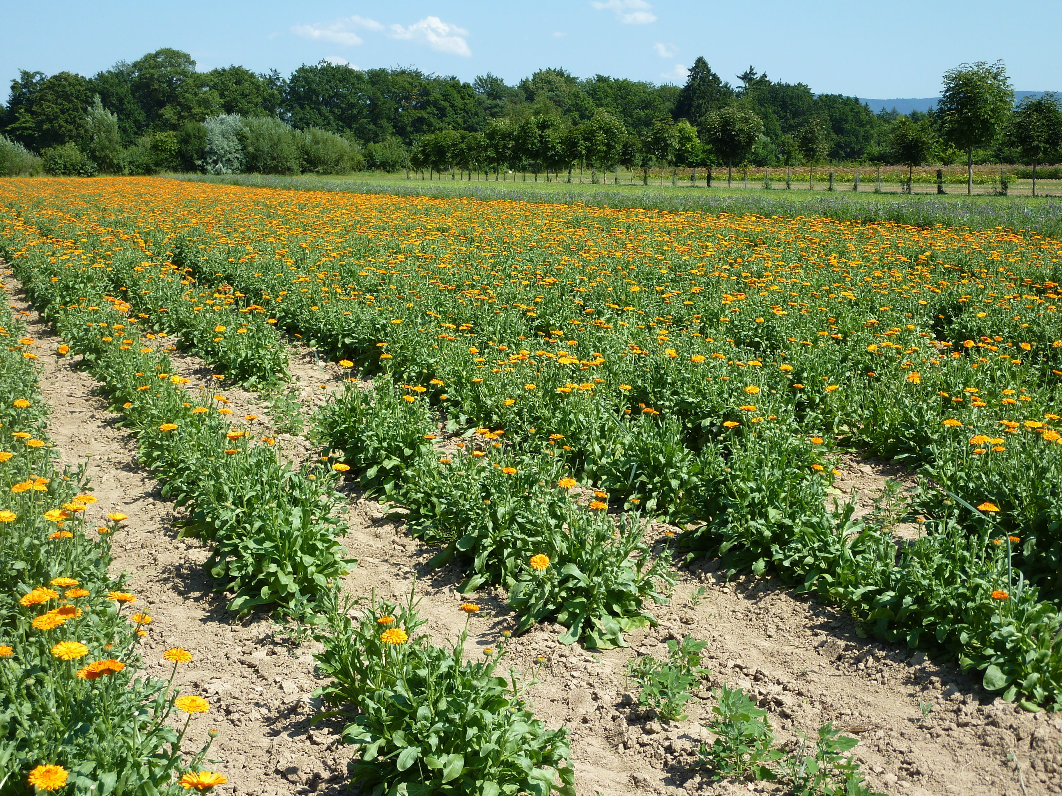 Calendula-Feld im Weleda-Heilpflanzengarten Schwäbisch Gmünd